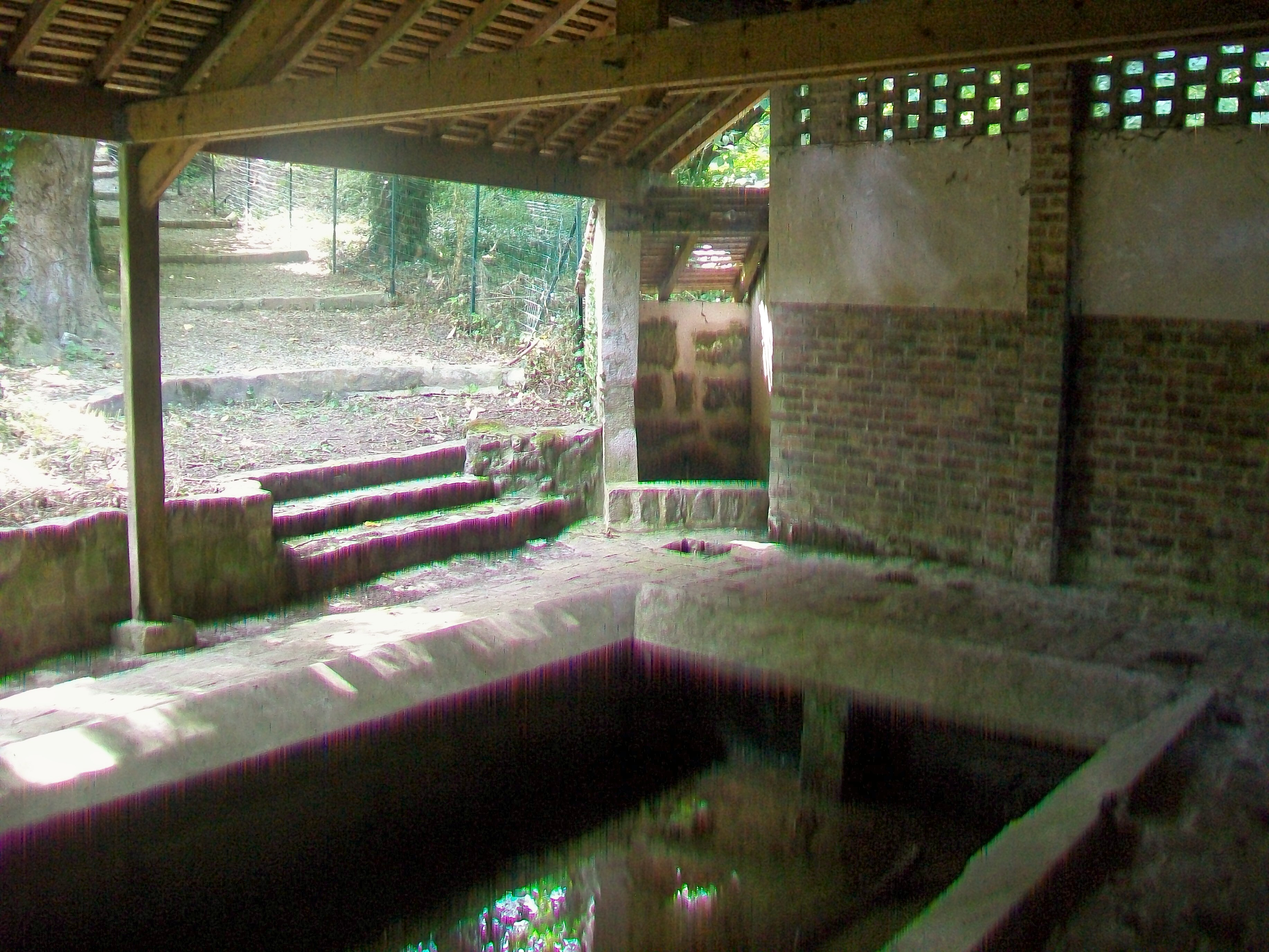 Le lavoir de Jouy-le-Comte, au bout d'une courte impasse depuis la rue du maréchal Joffre, à peu de distance au nord de l'église. Ce lavoir est alimenté par une source, visible à gauche.